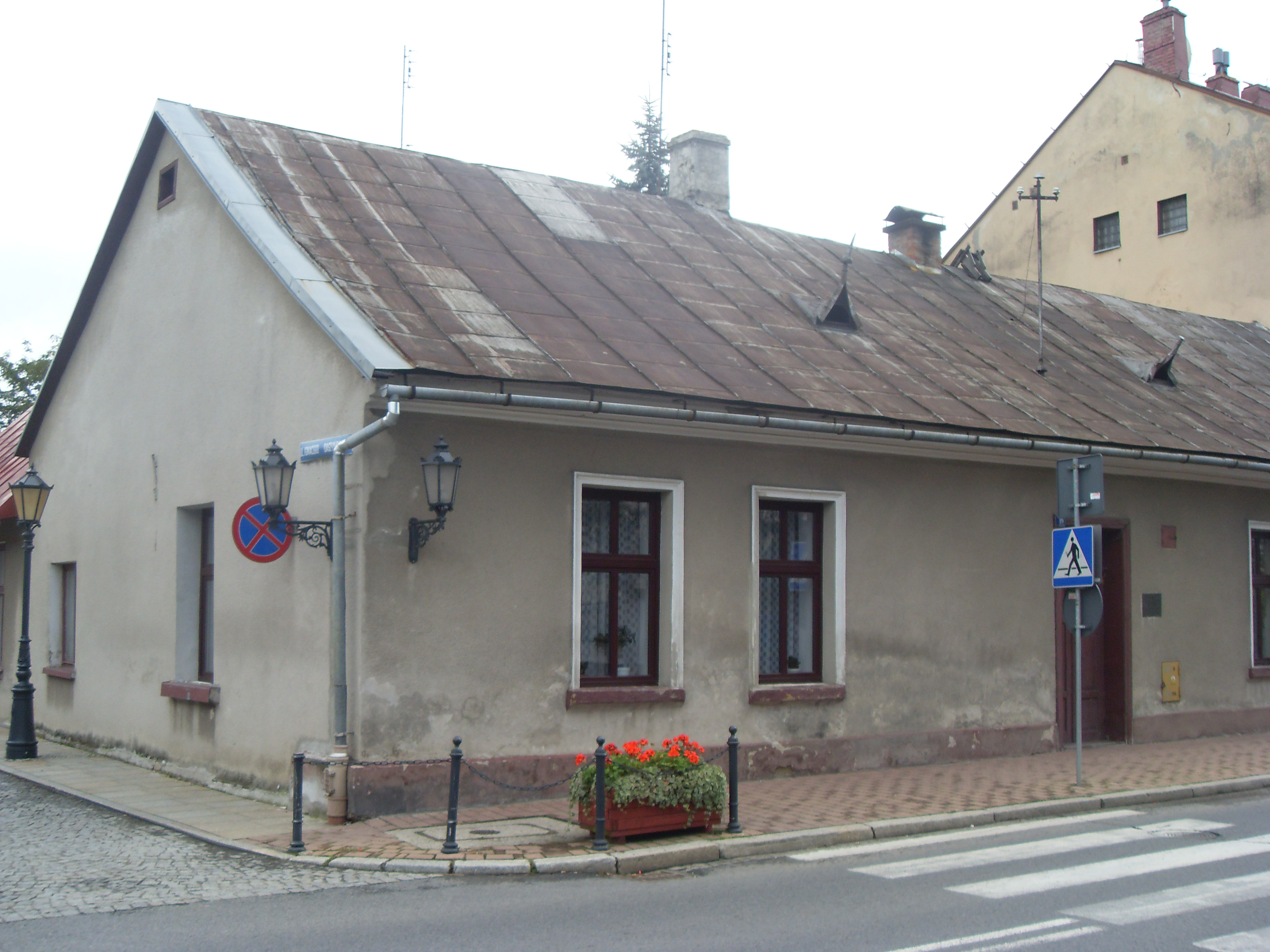 Dom Ady Sari w Starym Sączu